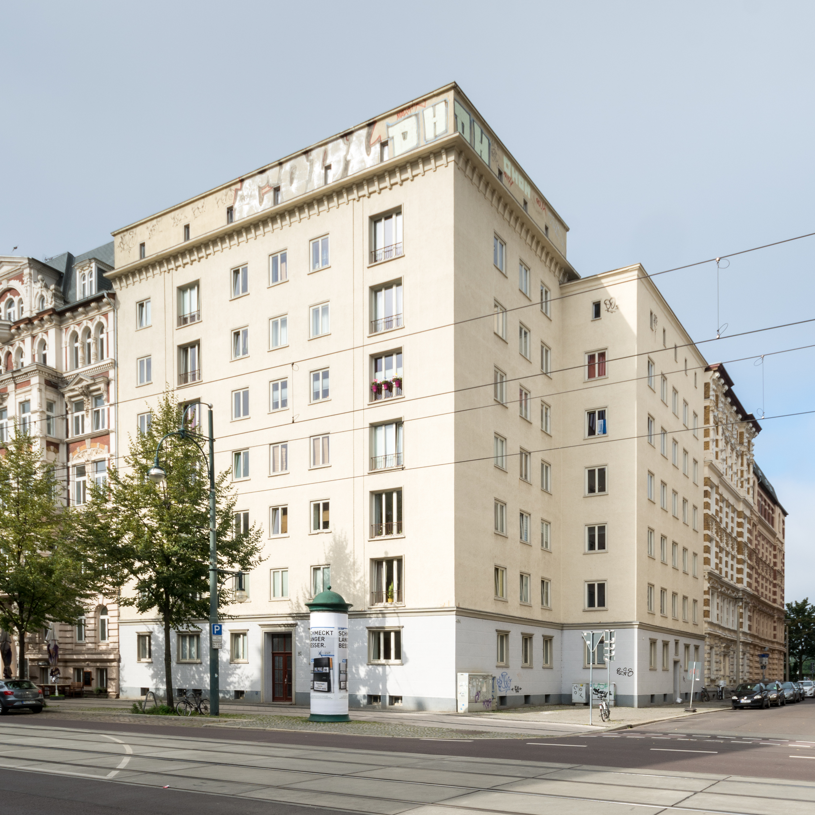 Wohnhaus Keplerstraße 6a, Otto-von-Guericke-Straße 47 in Magdeburg-Altstadt. This is a photograph of an architectural monument.It is on the list of cultural monuments of Magdeburg